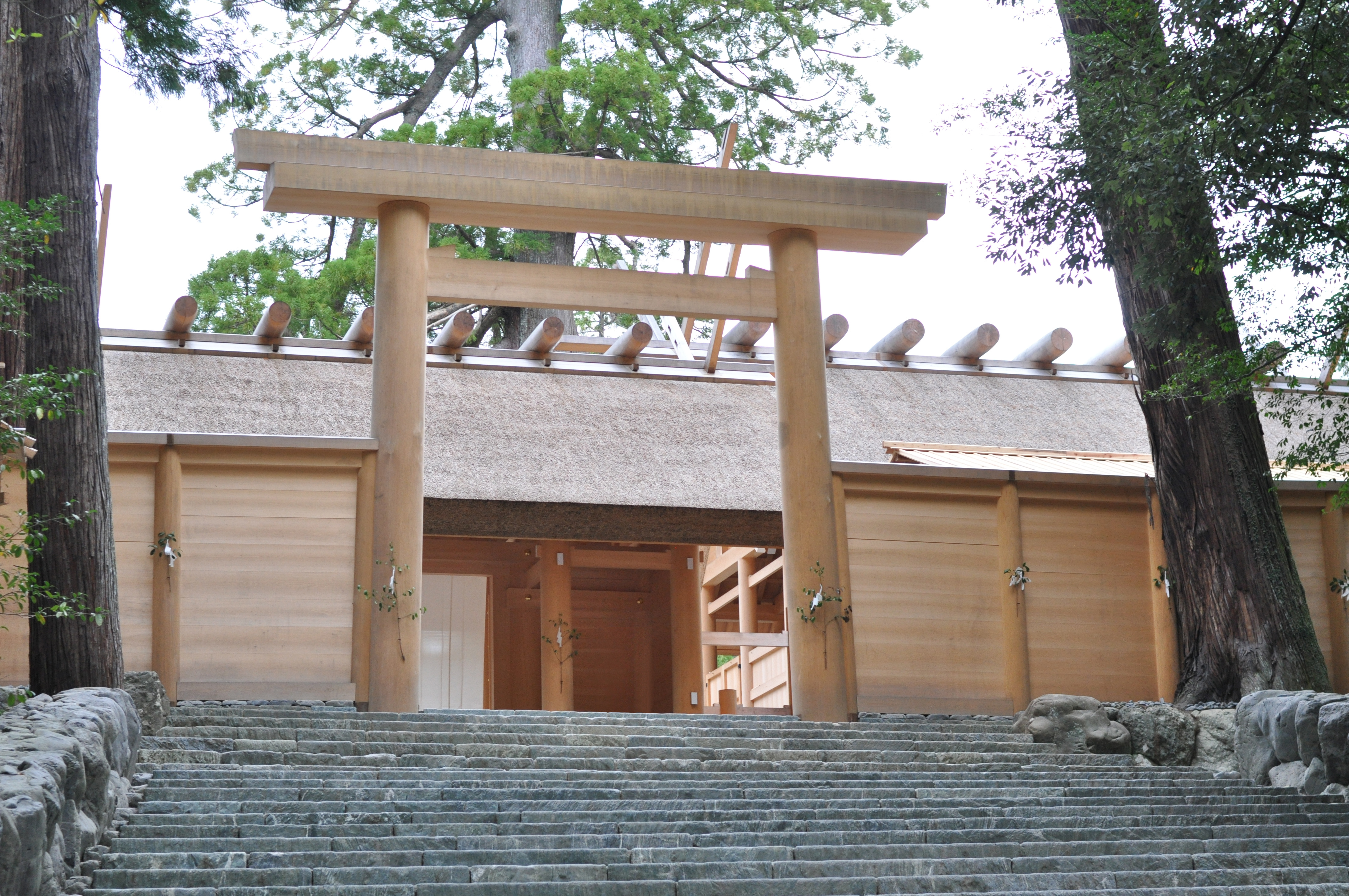 平成25年の式年遷宮に建てられた伊勢神宮内宮の正殿